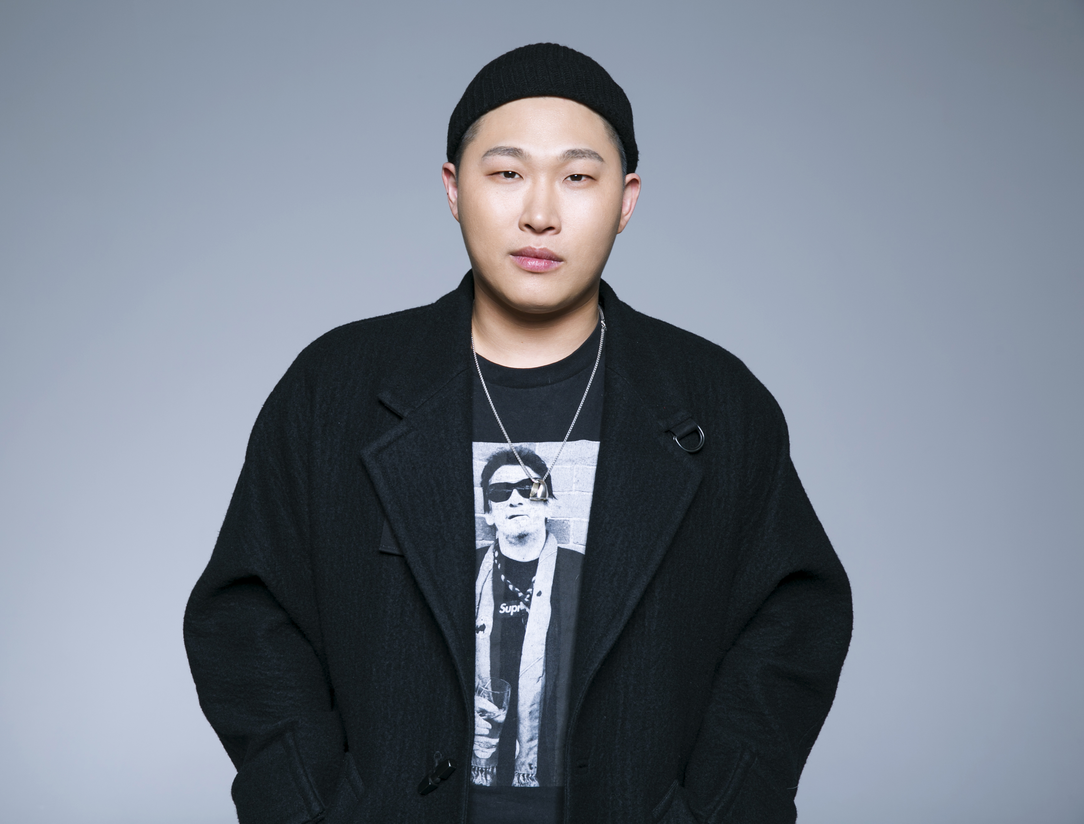 2017 스윙스